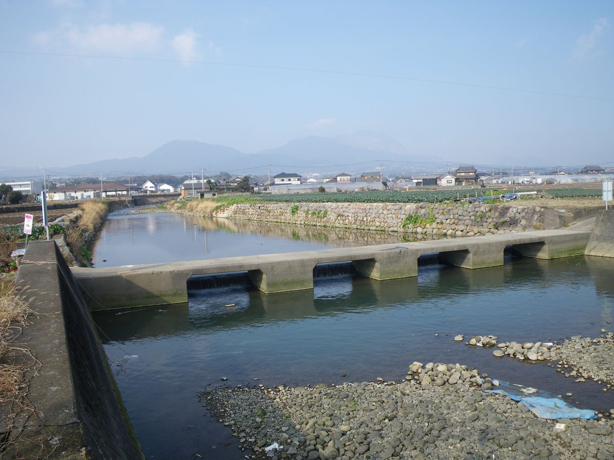 有家川河口。沈下橋が架かる。長崎県南島原市（Arie river,Minamishimabara,Nagasaki）